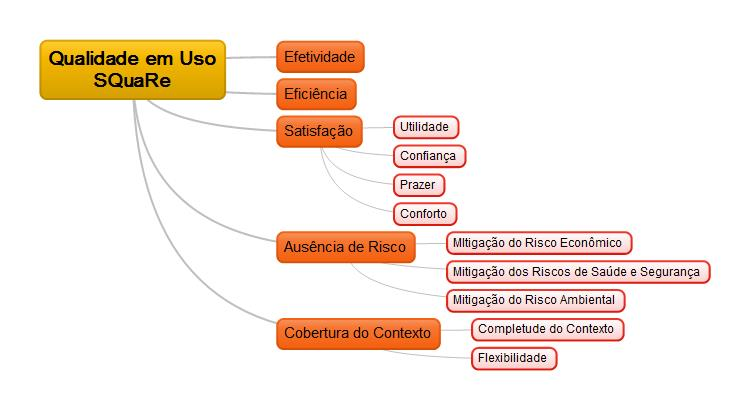 Qualidade em uso